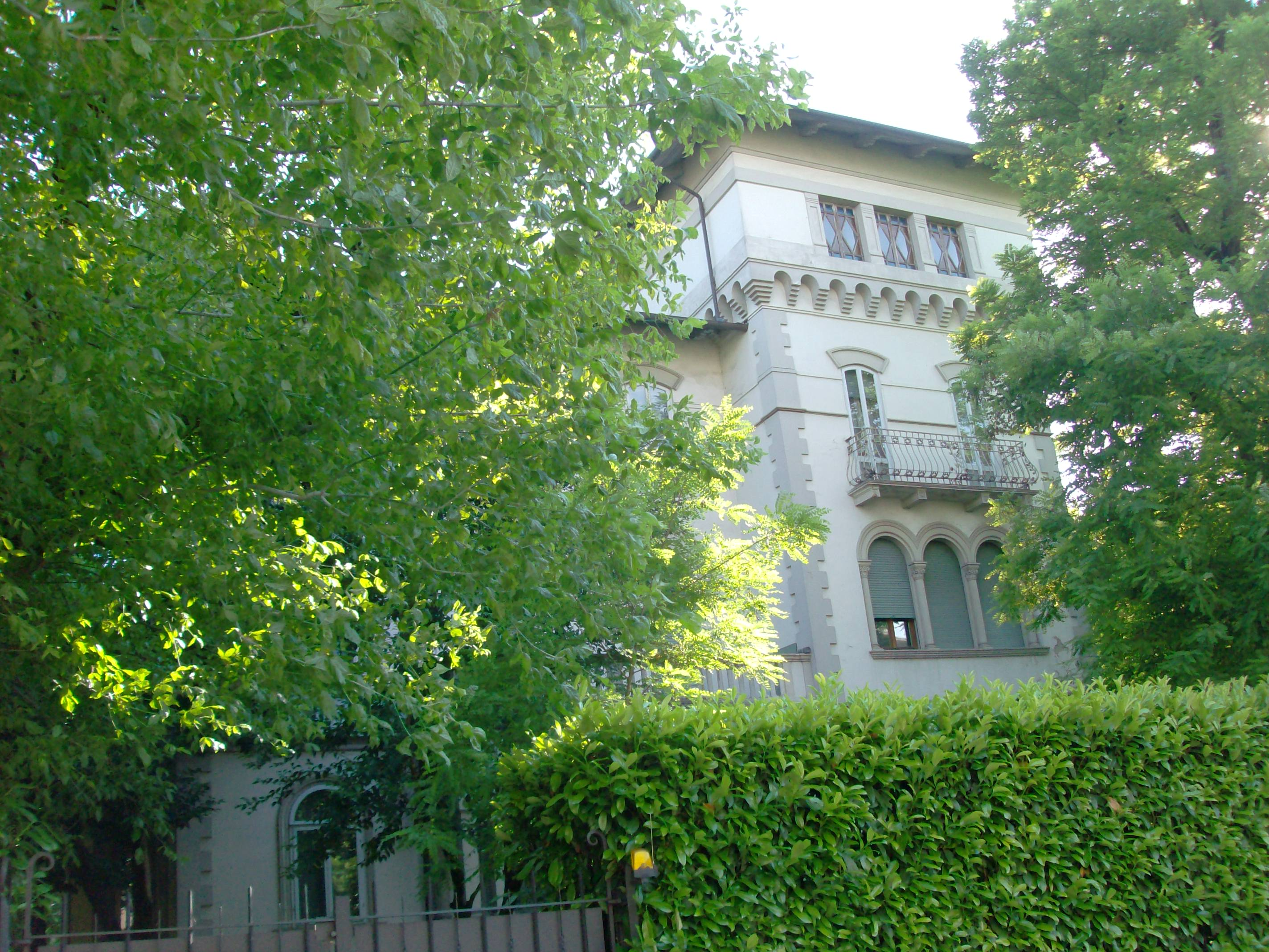 Villa Fano in viale Cavour 149 a Ferrara